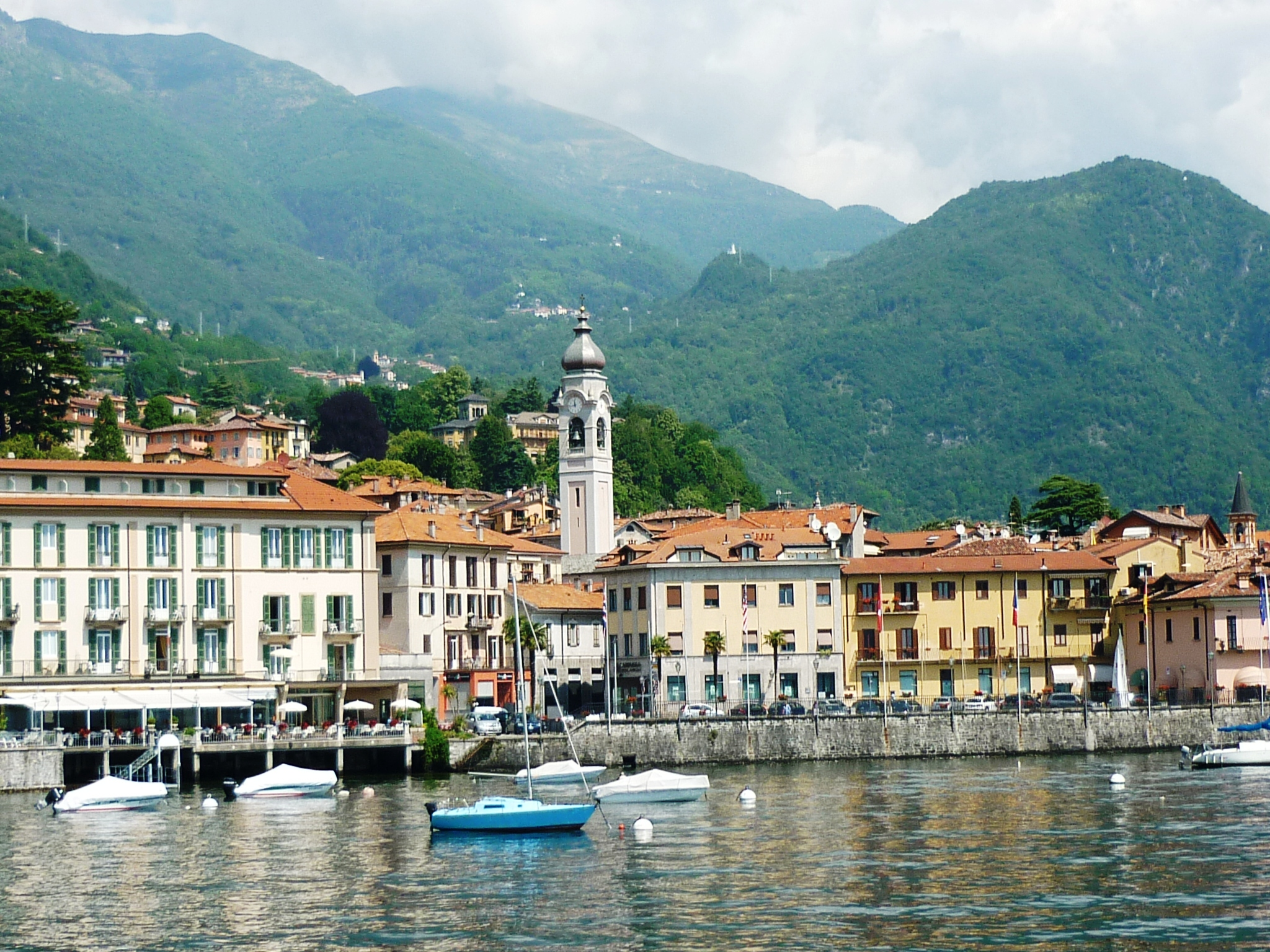 Menaggio mit Kirche Santo Stefano, Comersee, Italien